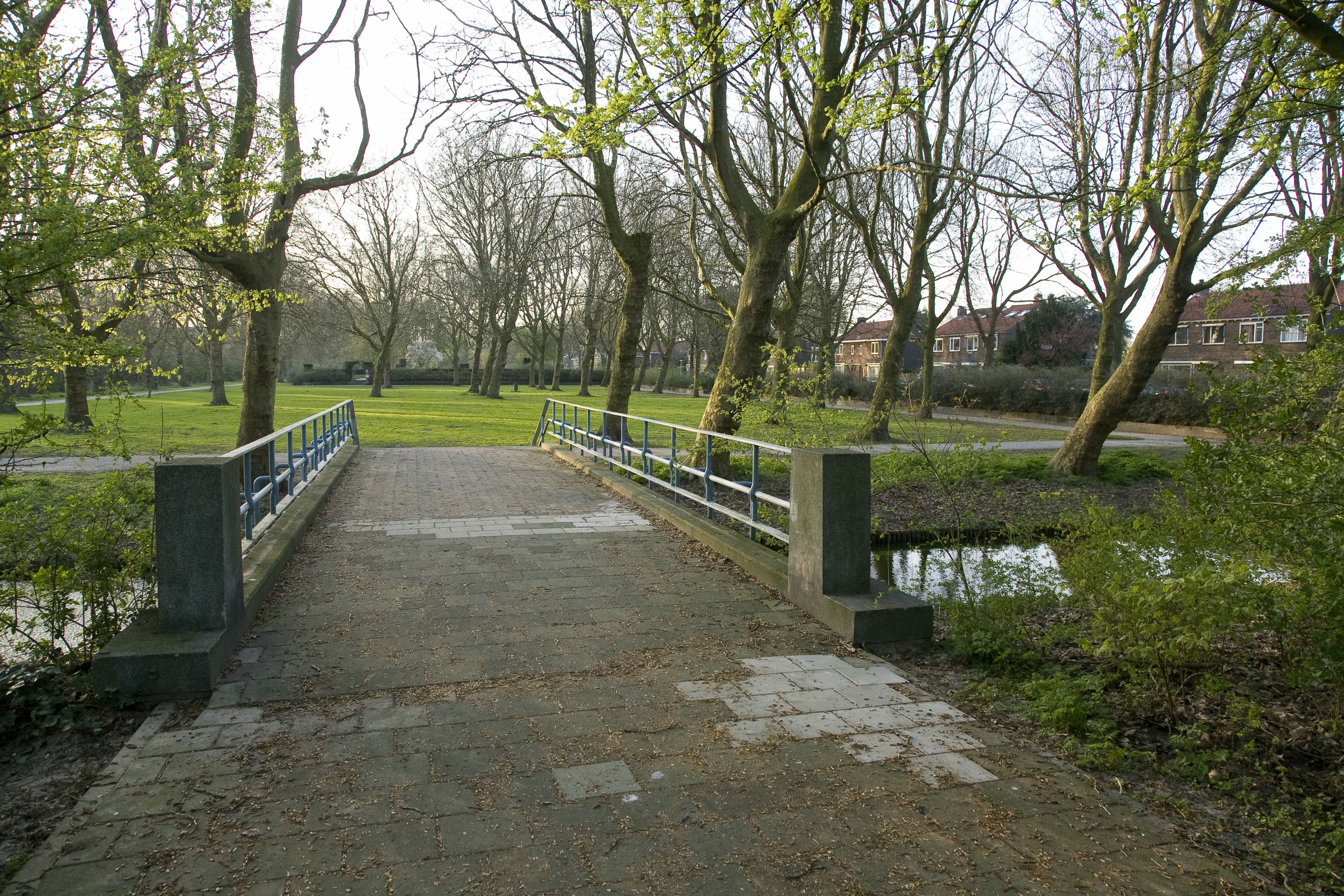 Darwinplantsoen: Overzicht stenen brug 443 in plantsoen